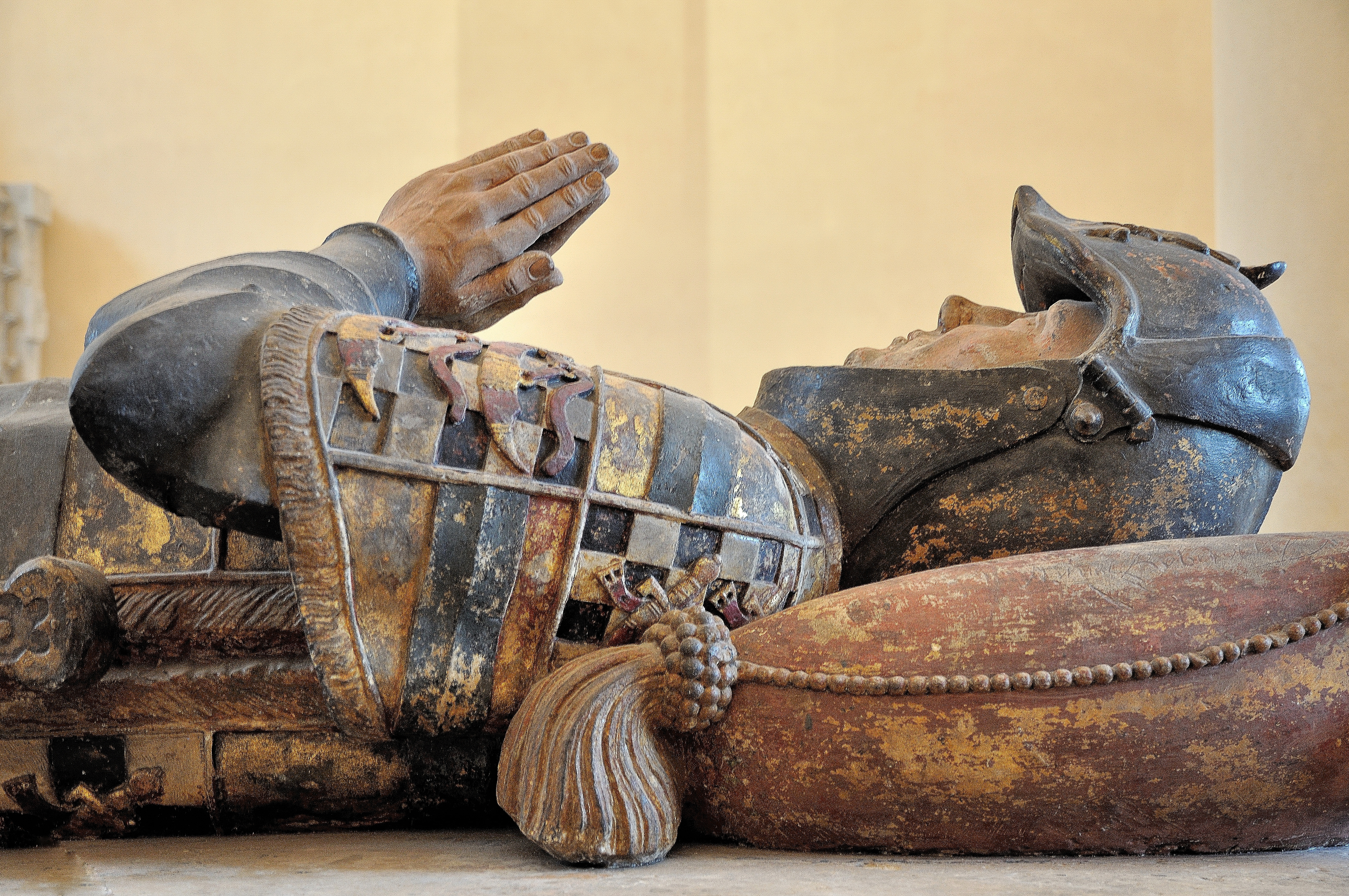 Effigie du chevalier Philippe Pot au Louvre à Paris